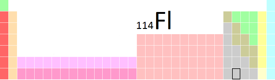 Localização do elemento Fleróvio (114) na tabela periódica